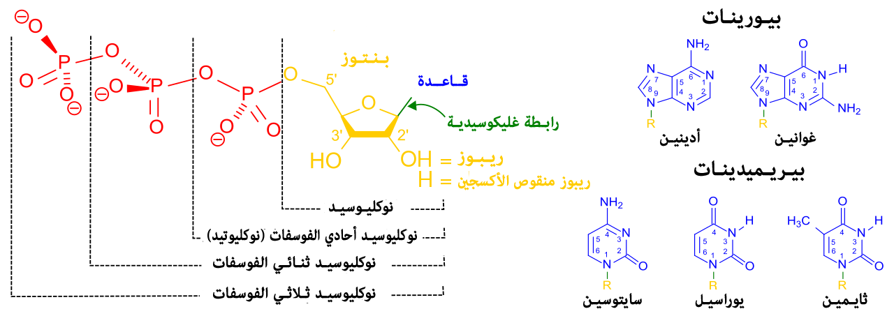 وصف لأنواع القواعد النووية والنوكسليوسيدات.